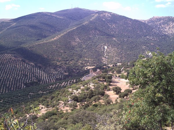 Al fondo, el pico Almadén, situado en el Parque Natural de Sierra Mágina.